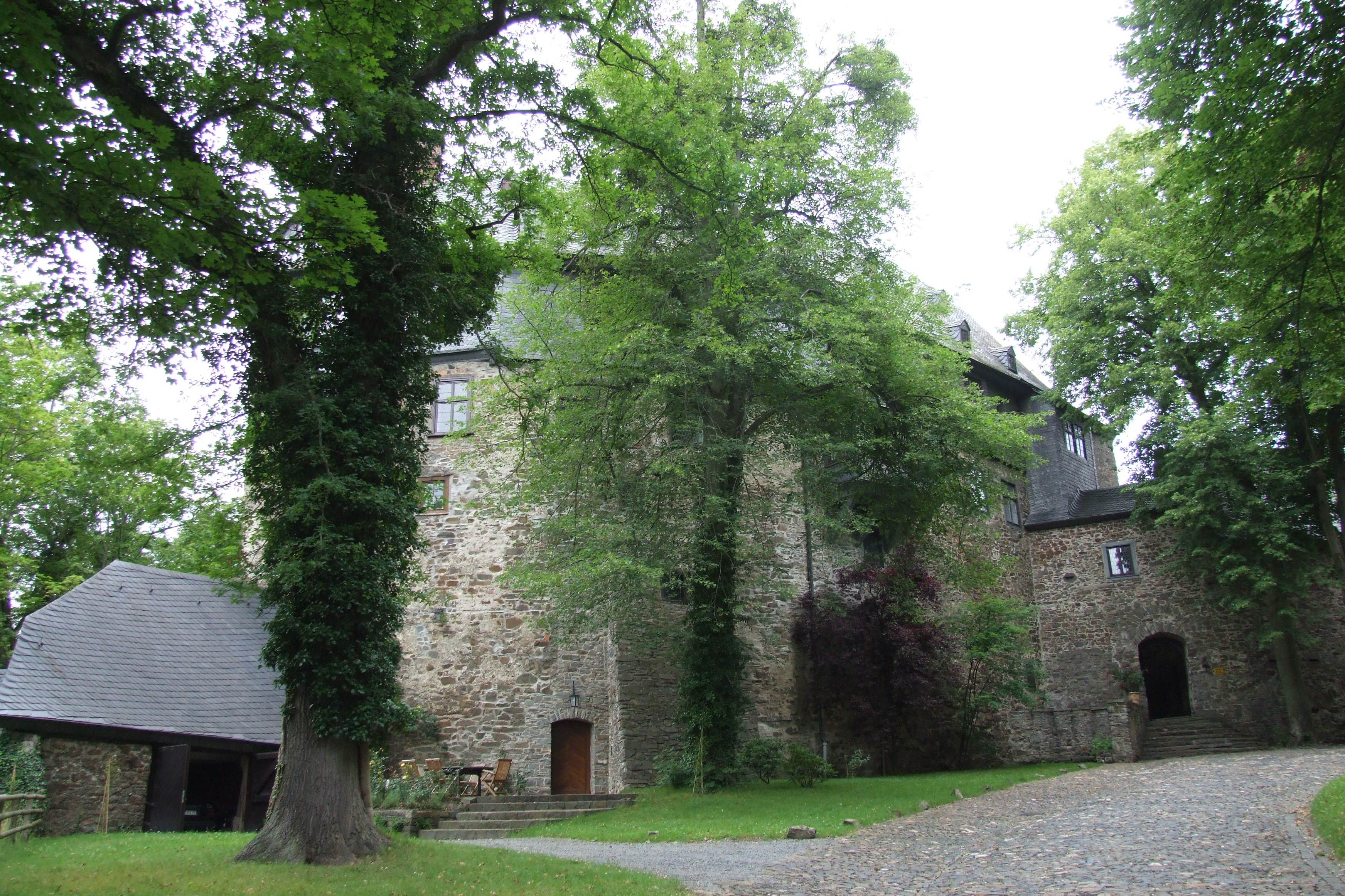 Schloss Schönstein im Wissener Stadtteil Schönstein